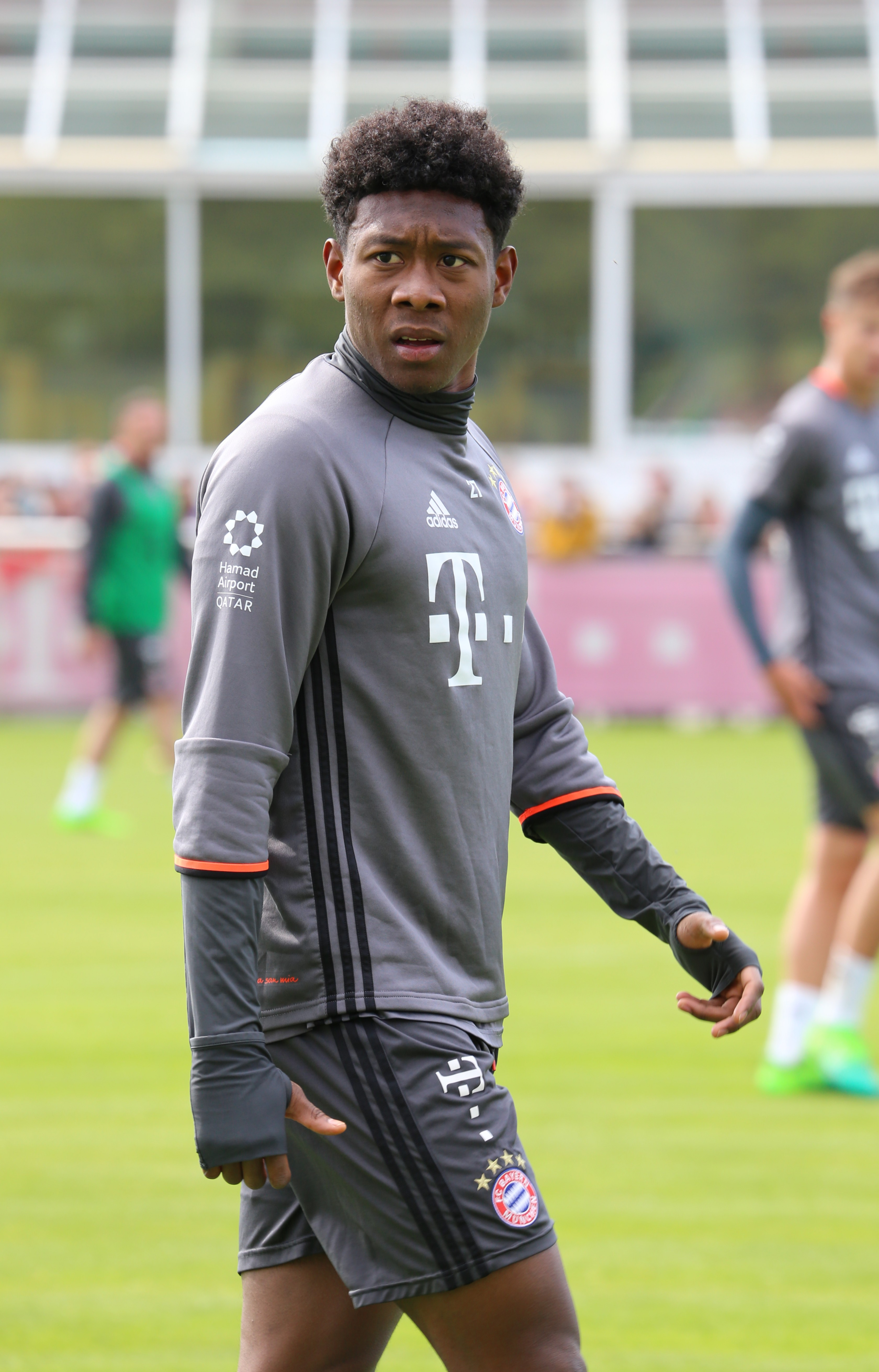 David Alaba, am 3. Mai 2017 beim Training auf dem Gelände des FC Bayern München